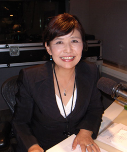 芳子ビューエル(良子ビューエル)よしこ ビューエルは、通販コンサルタント。